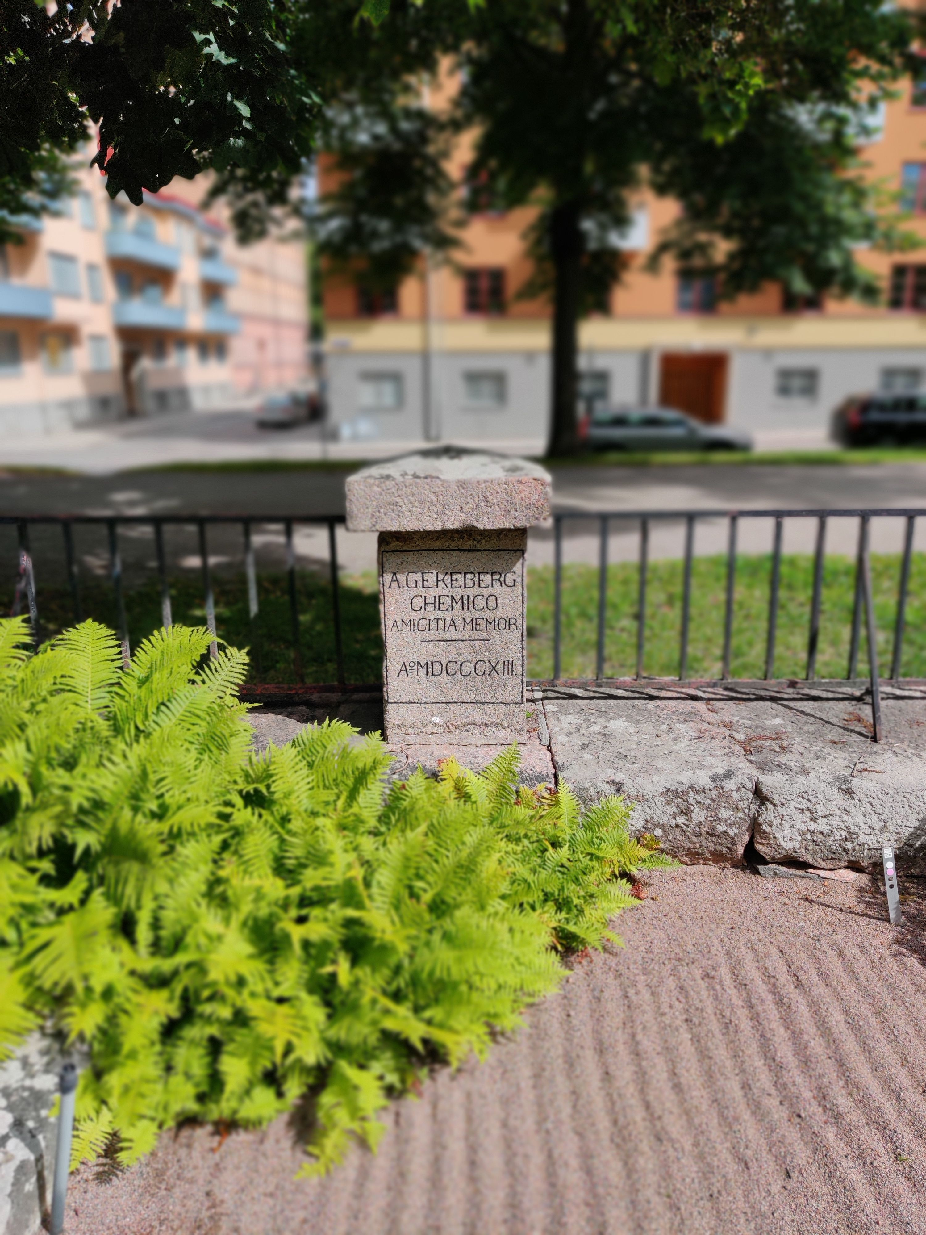 Gravplatsen pp Uppsala gamla